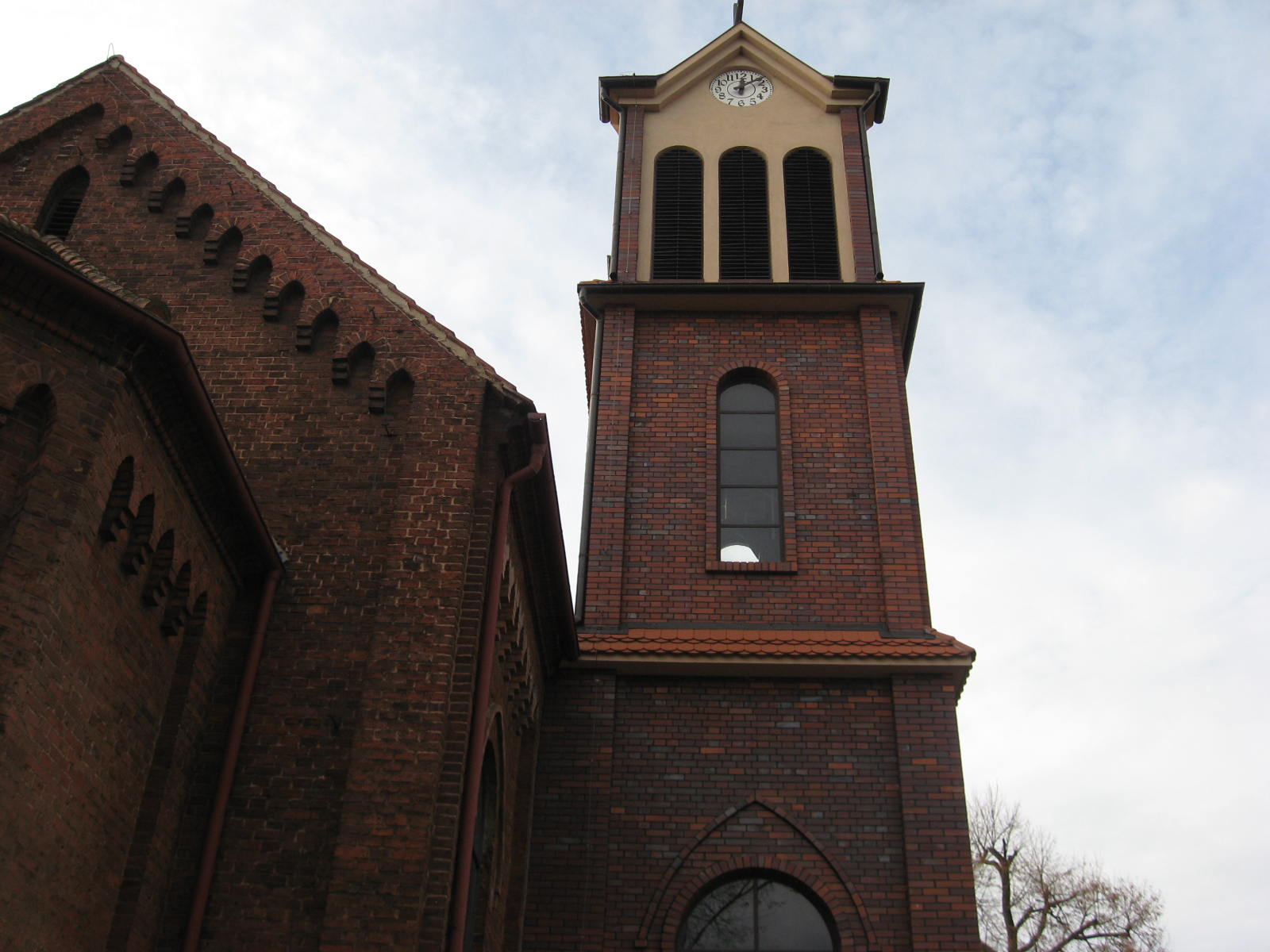 Wieża kościoła 03